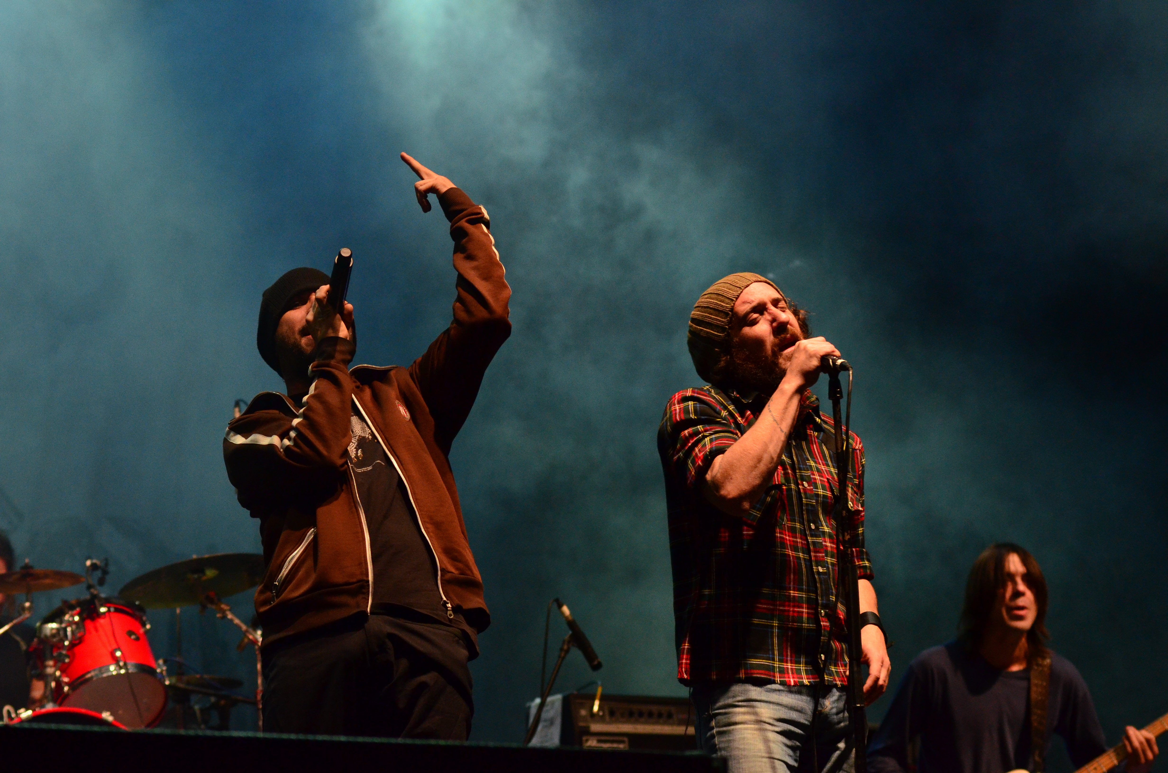 La Vela Puerca en 2011